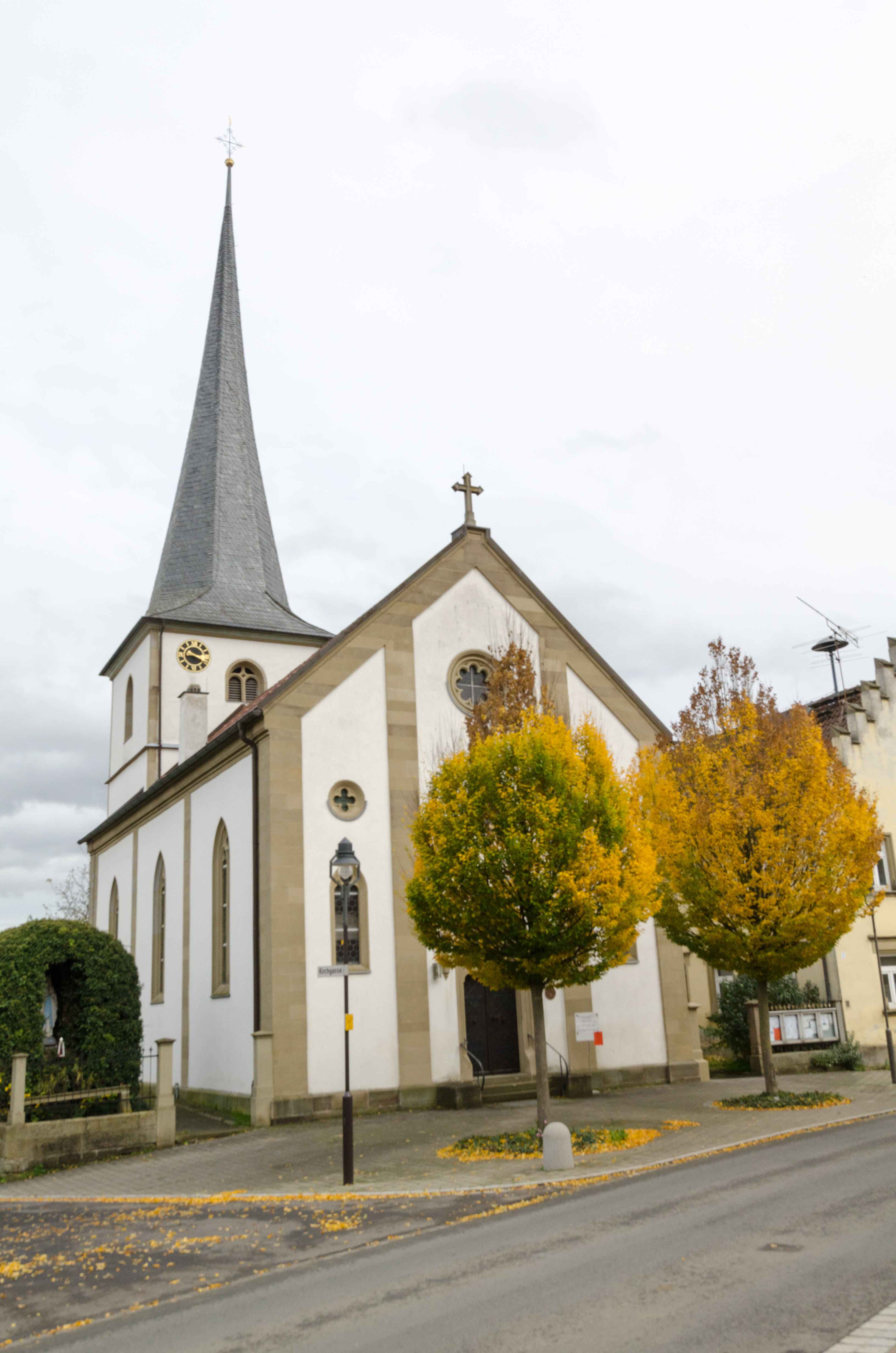 Kronungen, Kath. Pfarrkirche St. Laurentius